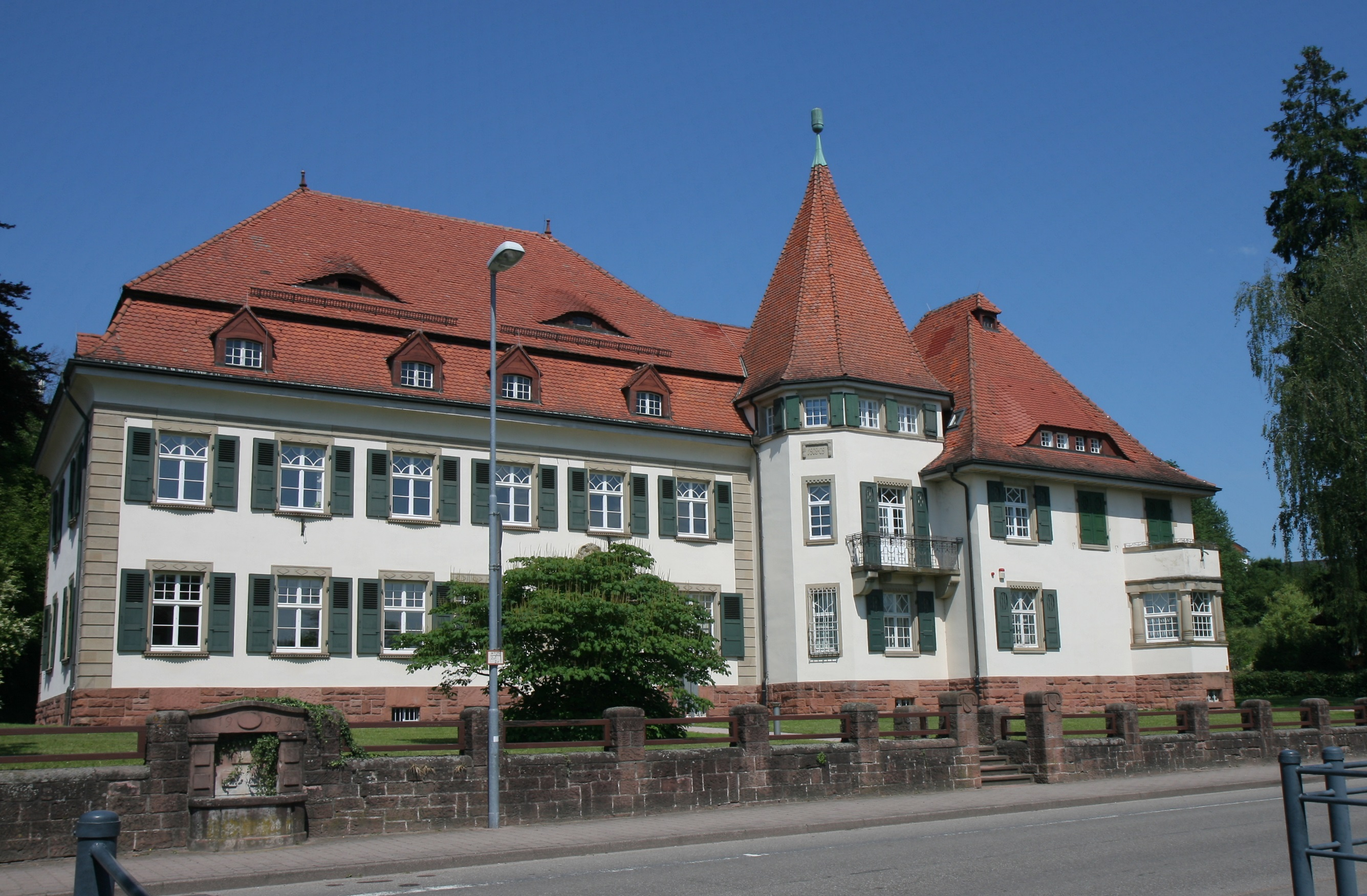 Amtsgericht Ettenheim, Otto-Stoelcker-Straße 8 in Ettenheim.